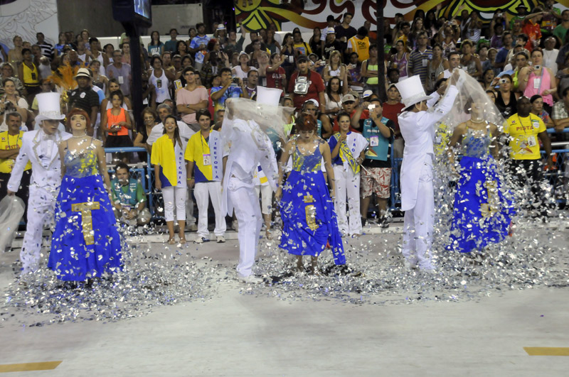 Unidos da Tijuca no Desfile das Campeãs 2010. Foto: Ricardo Almeida.